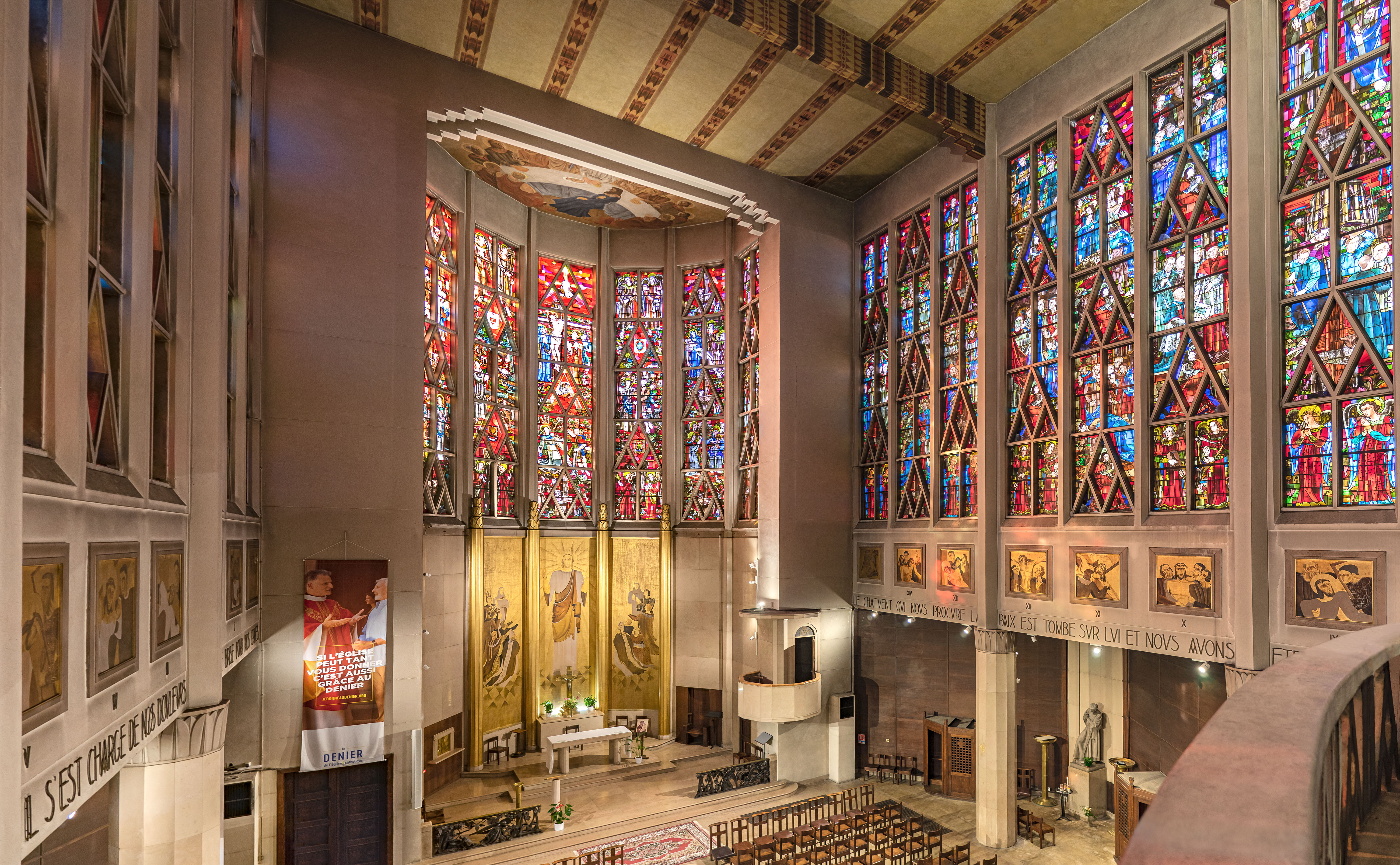 L'Eglise Sainte-Agnès d'Alfort est située sur les bords de Marne à Maisons-Alfort. Cette vue intérieure d'ensemble met en relief l'unité de son architecture qui s'allie harmonieusement avec vitraux, fresques, sculptures et ferronnerie.